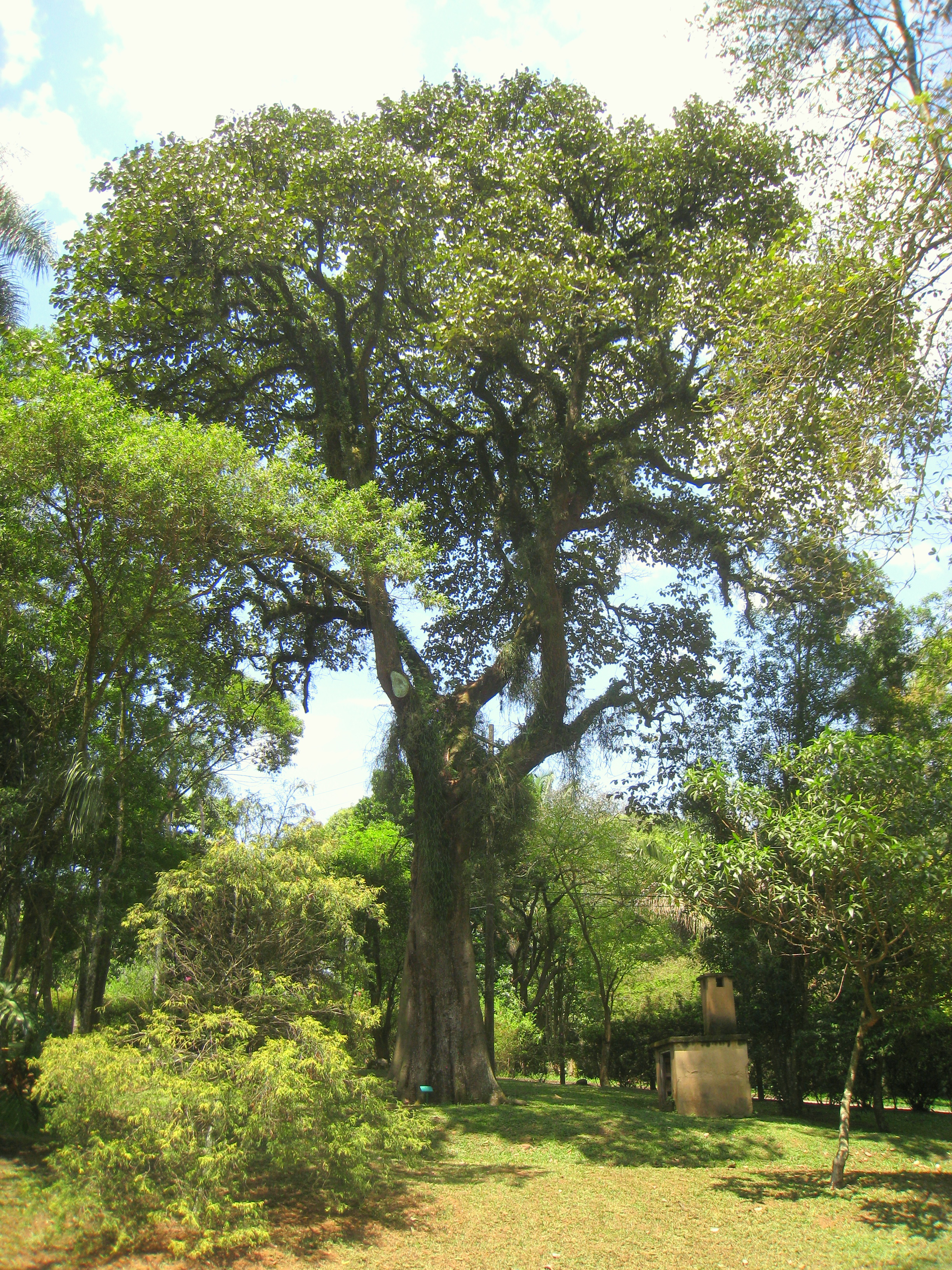 Luehea grandiflora in the Jardim Botânico de São Paulo, São Paulo City, SP, Brazil.